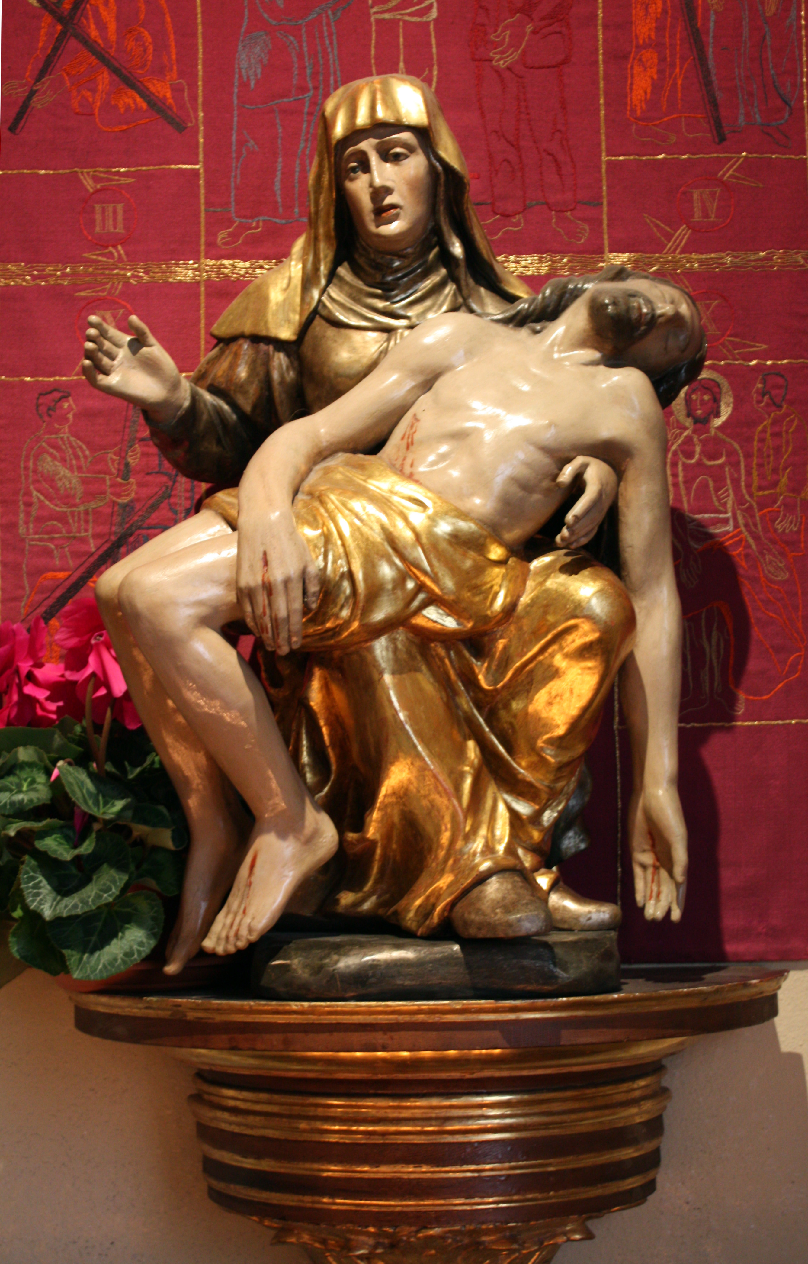 Brühl, Schlosskirche St. Maria von den Engeln, Pieta aus dem 17.–18. Jahrhundert